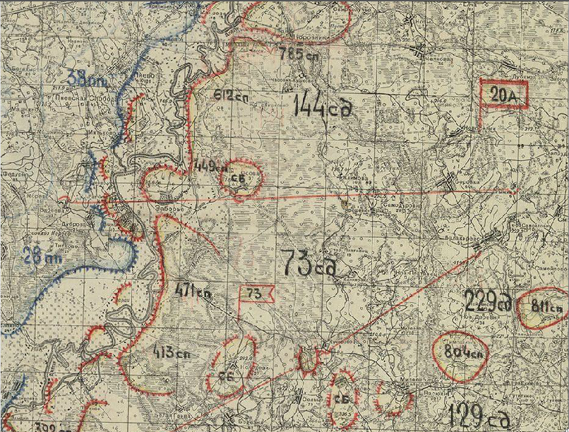 Отчетная карта оперативного отдела штаба Западного фронта за 15.09.1941 - 25.09.1941 г. Части 20-й армии